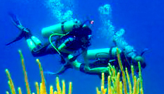 Plongée à Cuba